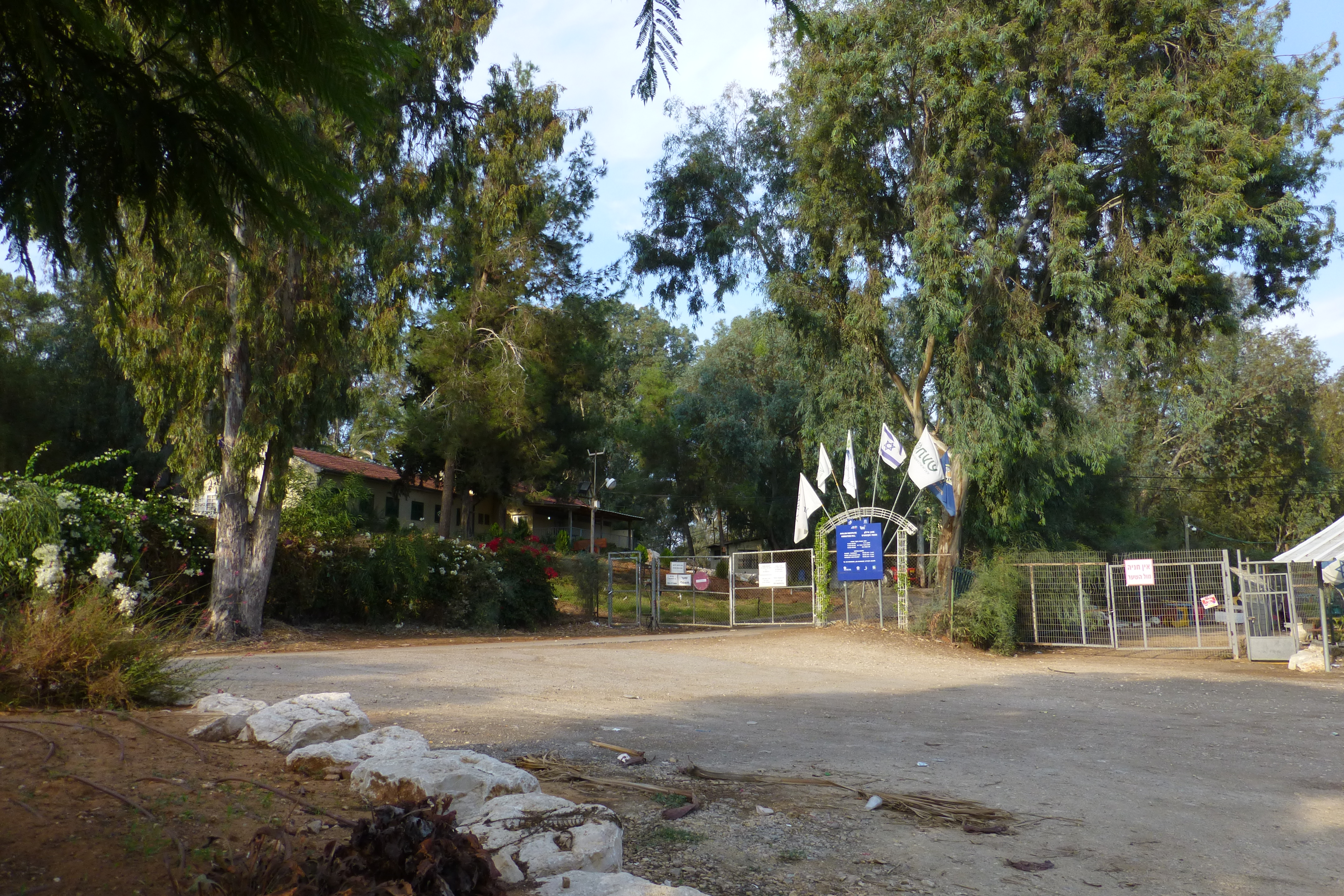 מכון איילון היה סליק ומפעל מחתרתי לייצור קליעים של ארגון ההגנה בגבעת הקיבוצים, השוכנת במבואותיה הצפוניים של העיר רחובות, בתקופת המנדט הבריטי.